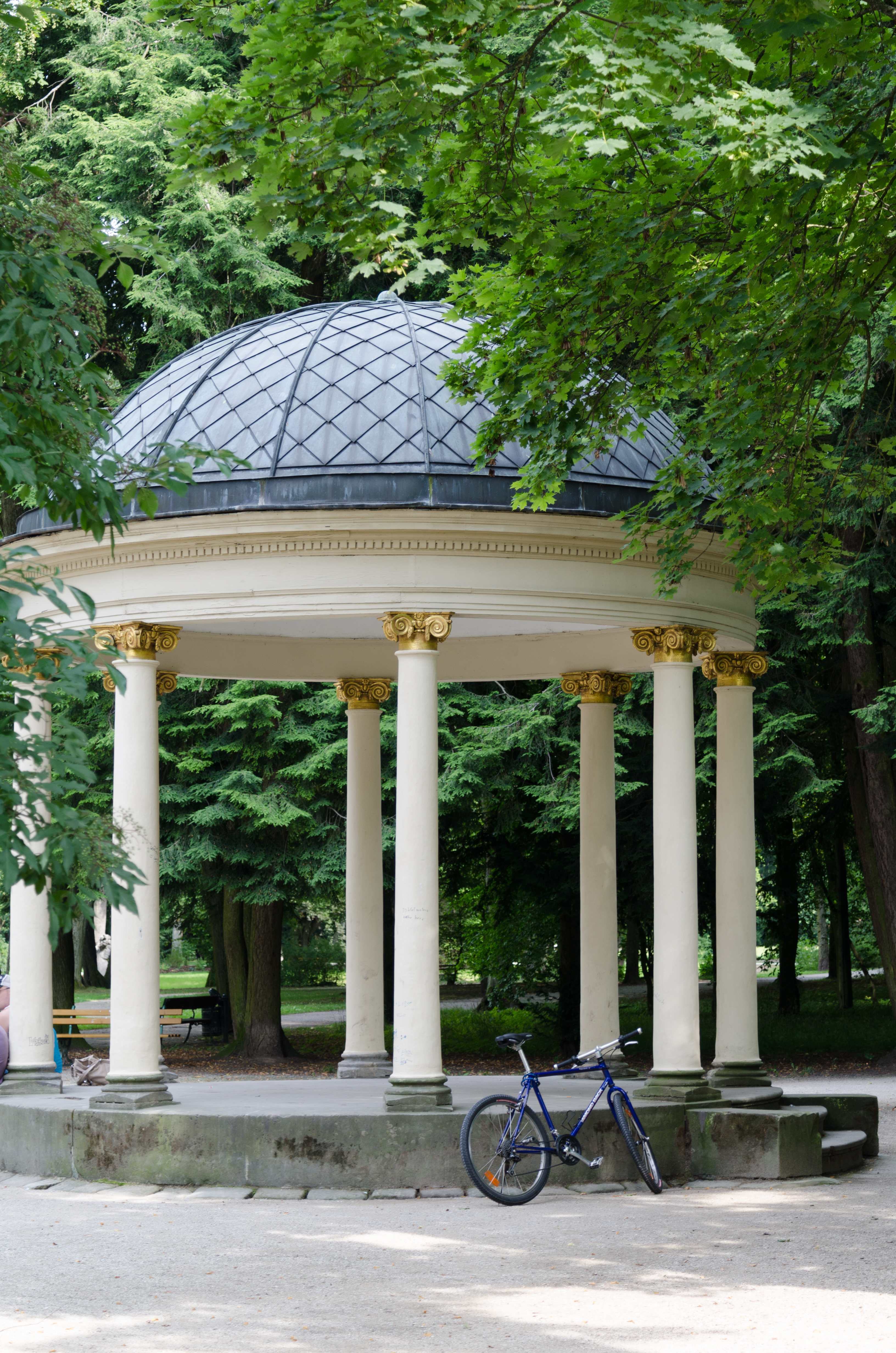 Bayreuth, Rundtempel (Monopteros mit Kuppel), sogenannter Sonnentempel im Hofgarten, von Carl Christian Riedel, Denkmal Nr. D-4-62-000-196